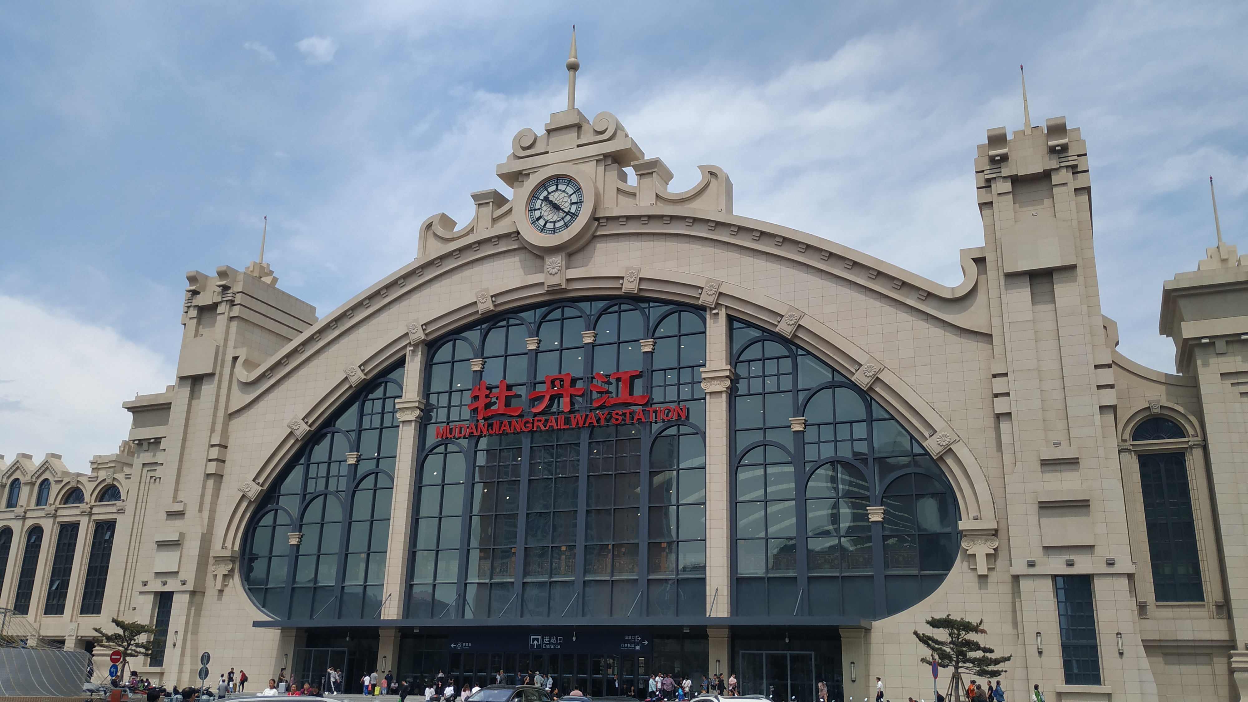 中文（中国大陆）: 新建牡丹江站